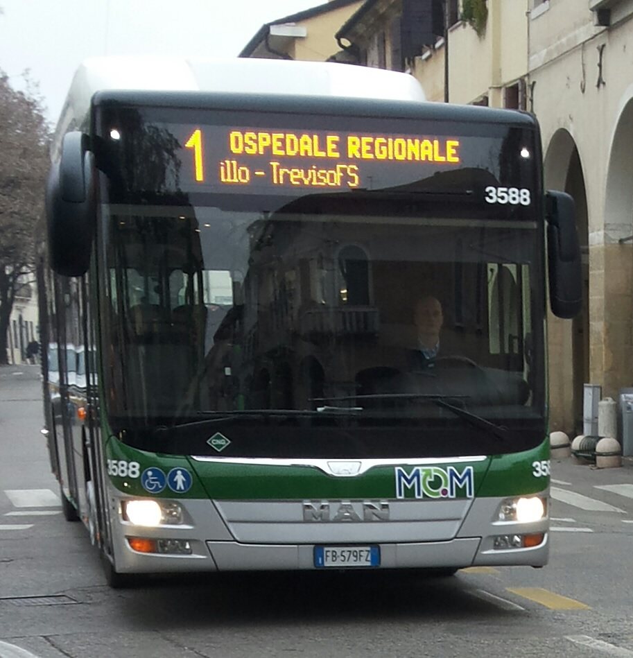 Autobus MAN Lion's City A21 a metano Euro 6 di Mobilità di Marca, in servizio sulla rete urbana di Treviso